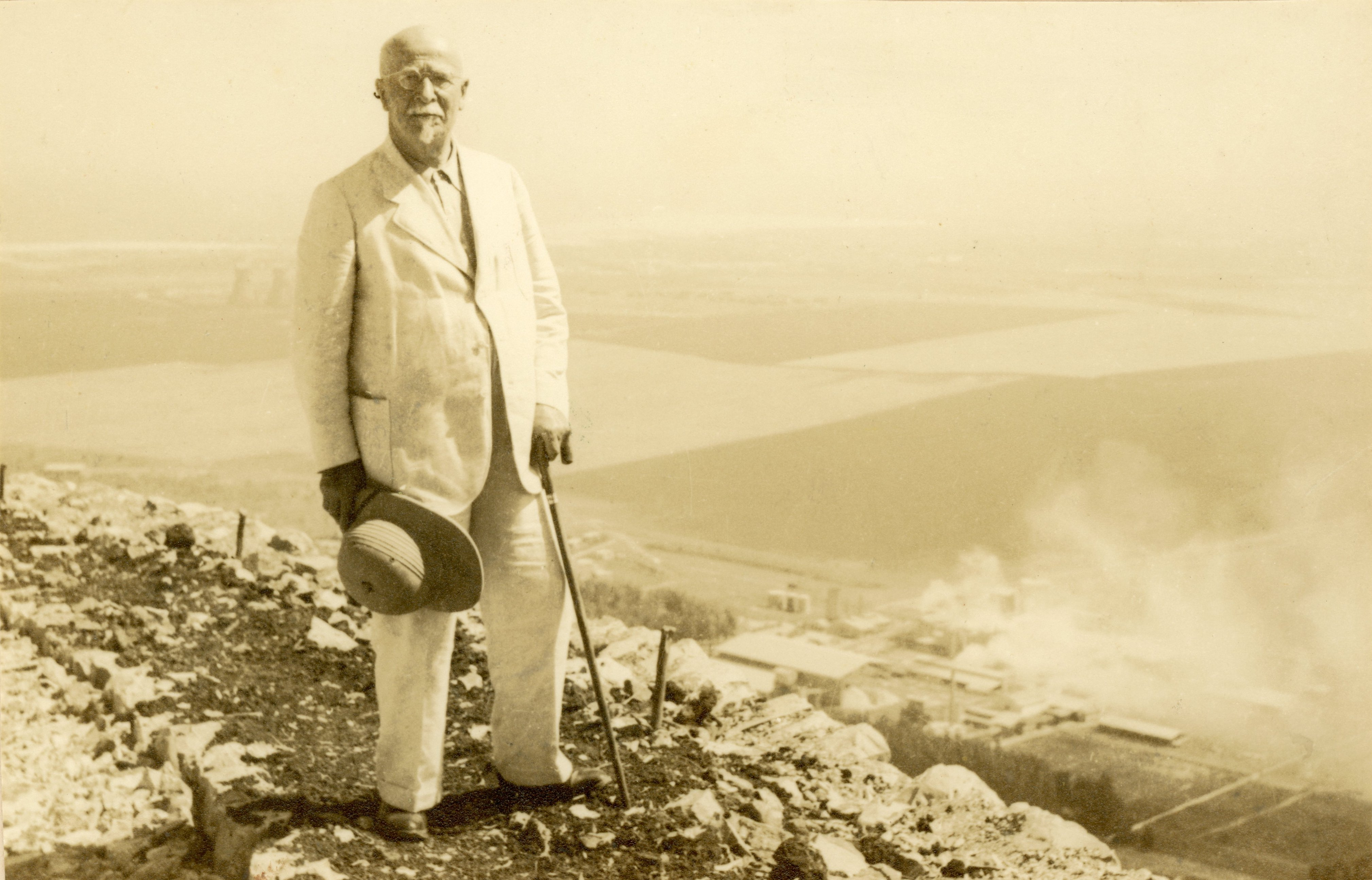 מיכאל פולק שהיה איש עסקים, יזם ותעשיין בתקופת היישוב, מייסד מפעל המלט נשר ומראשי החברה להתיישבות יהודית בארץ־ישראל